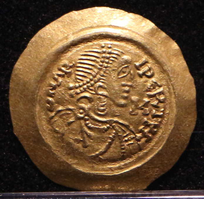 Museo Archeologico Nazionale di Cividale This is a photo of a monument which is part of cultural heritage of Italy.